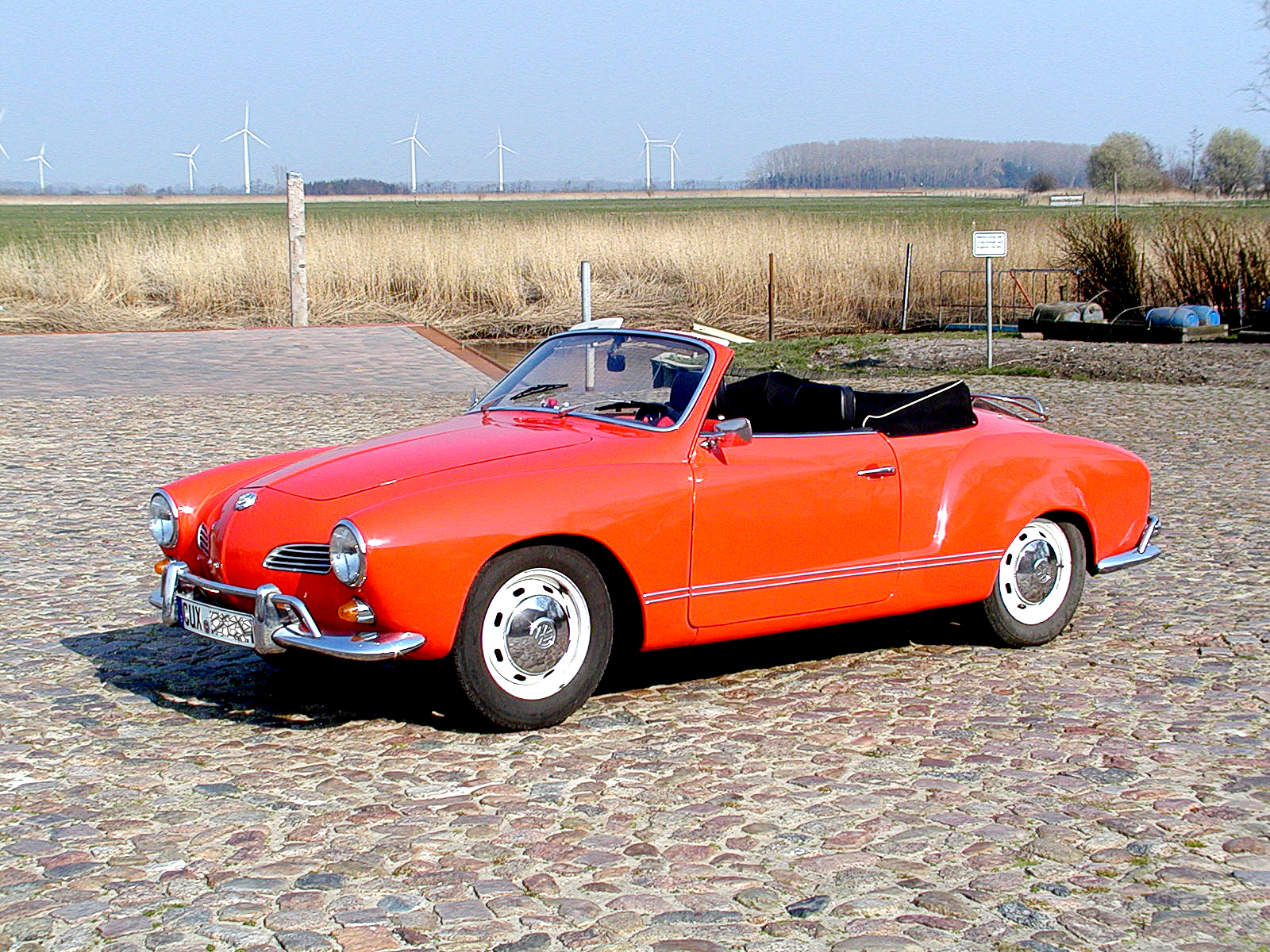 Ein Karmann Ghia in rot von der Seite